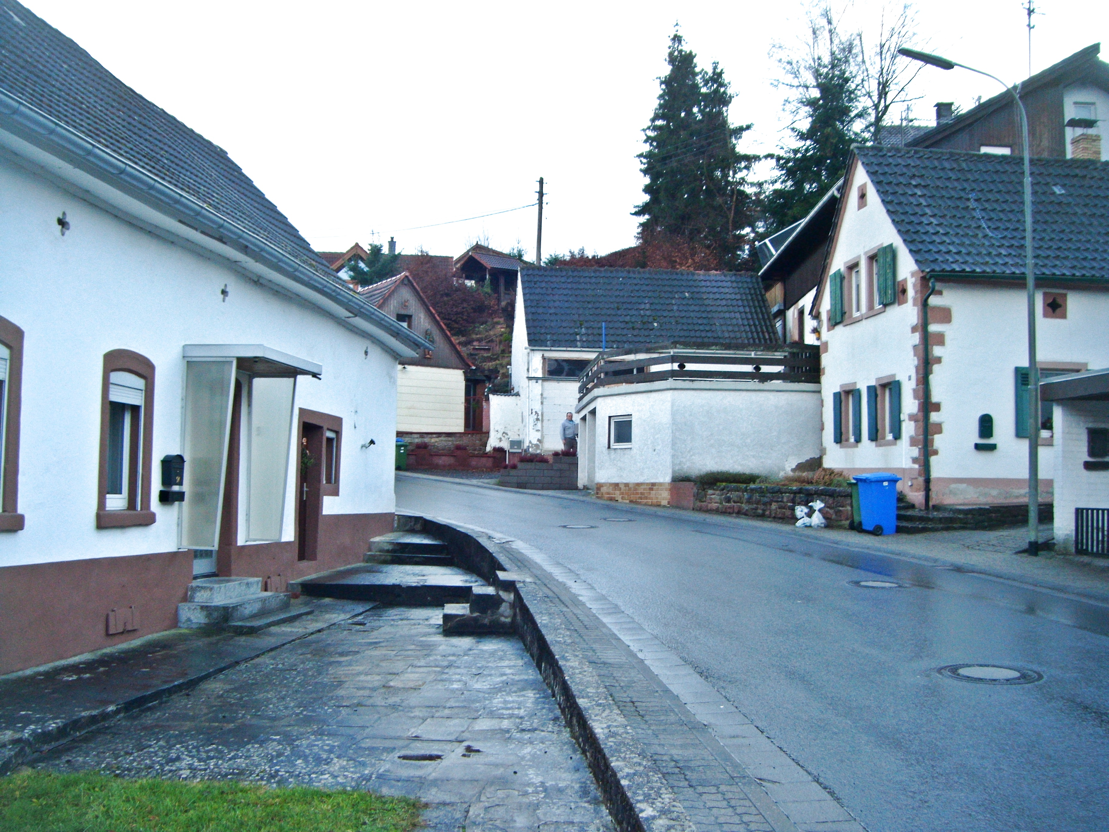 Hertlingshausen, Klosterhofstraße. In beiden Häusern (rechts und links) sind Spoliensteine des Klosters eingelassen (Fensterluken aus Sandstein, in Form von griechischen Kreuzen)